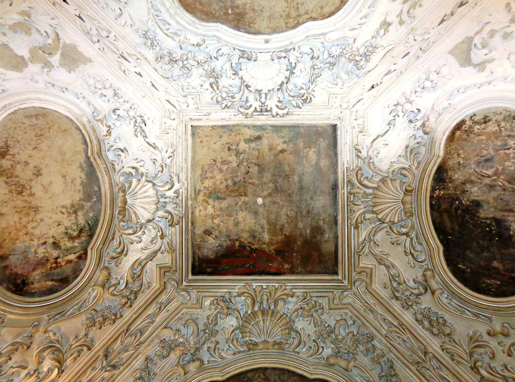 Castello Spadafora, interno - decorazioni volte, Notte Bianca 28 07 2013, scatto già presente sulla pagina personale FB